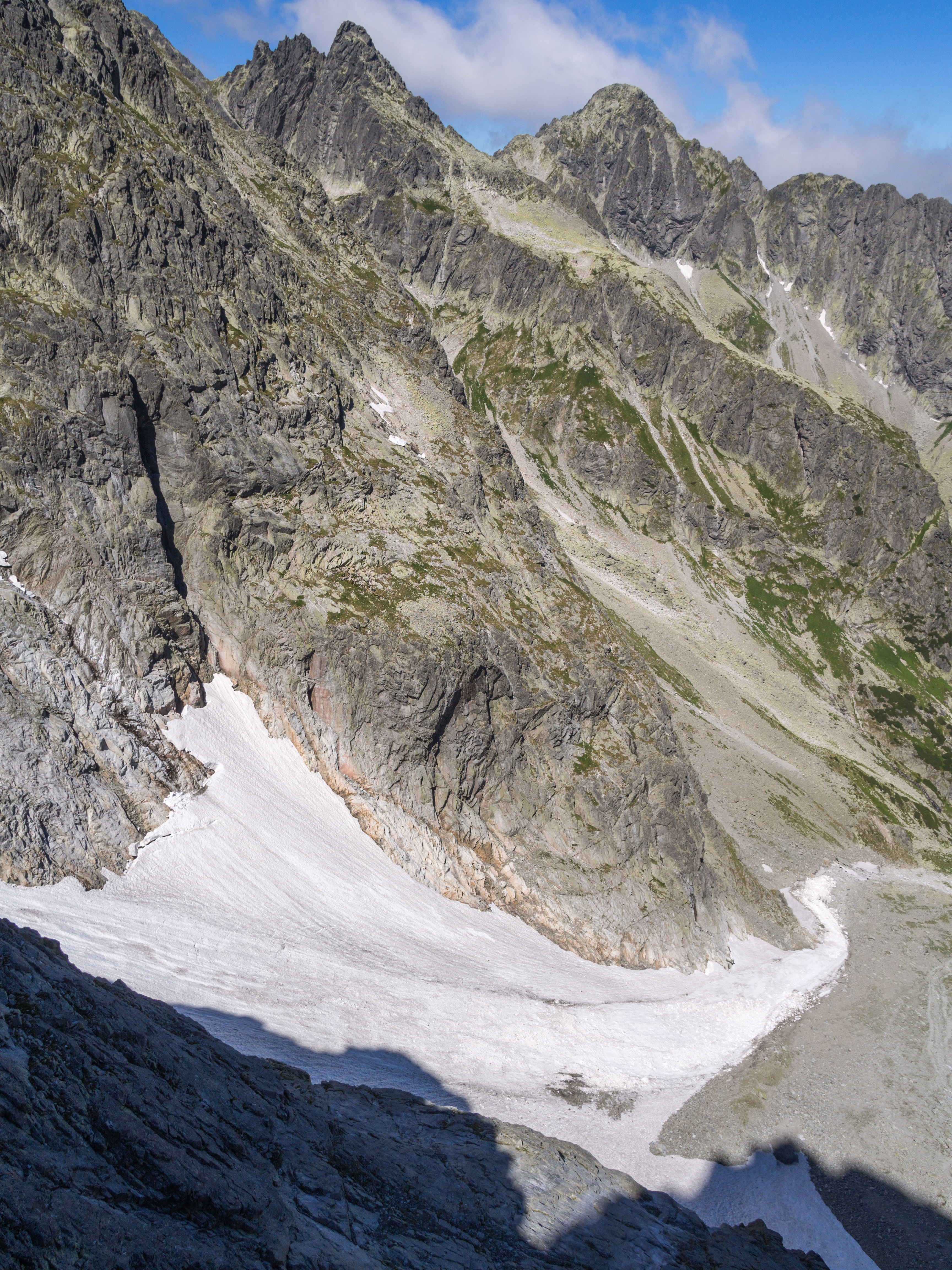 Lodowczyk w Miedzianej Kotlinie (Miedziany Śnieżnik), w tle Papirusowe Turnie, Czarny Szczyt i Kołowy Szczyt.